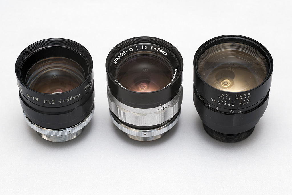 日本光学工業 CRTニッコール 55mm f/1.2(中央)および後年製造された同等品 FJW 54mm f/1.2(左) JML 56mm f/1.2(右)